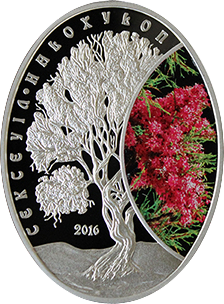 Саксаул